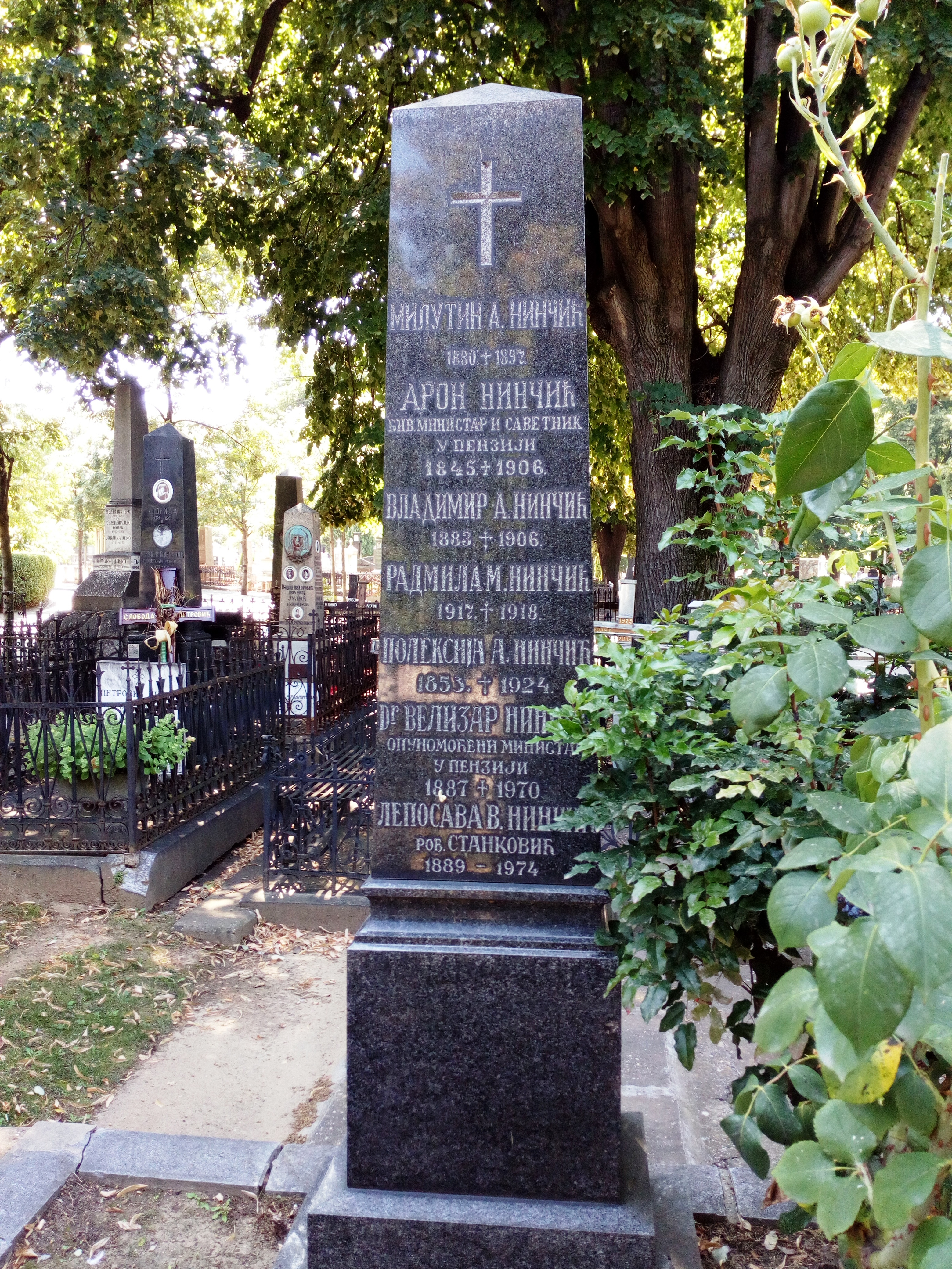 Гробница породице Нинчић на Новом гробљу у Београду